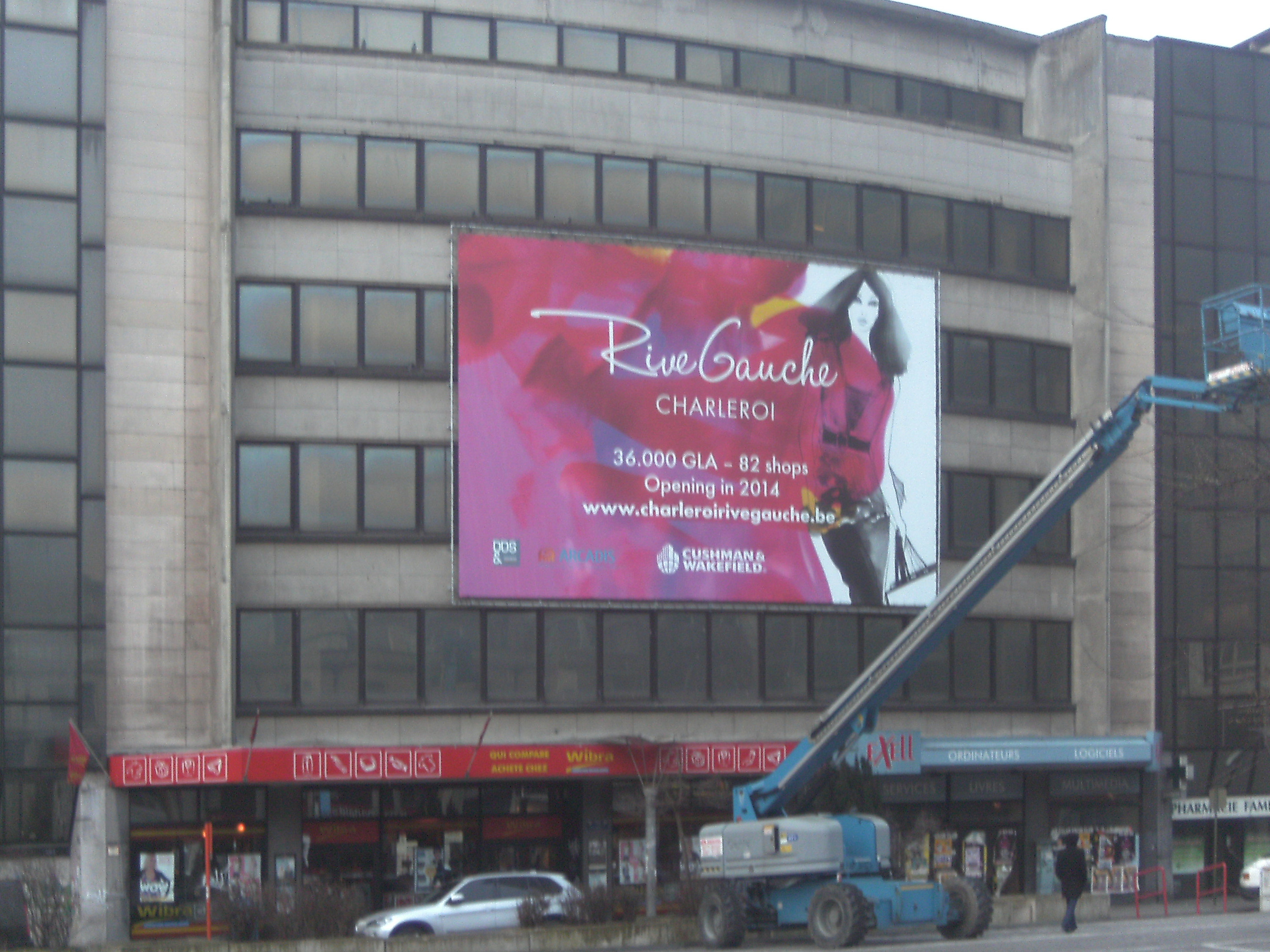 Rive gauche (Charleroi) - affiche d'annonce